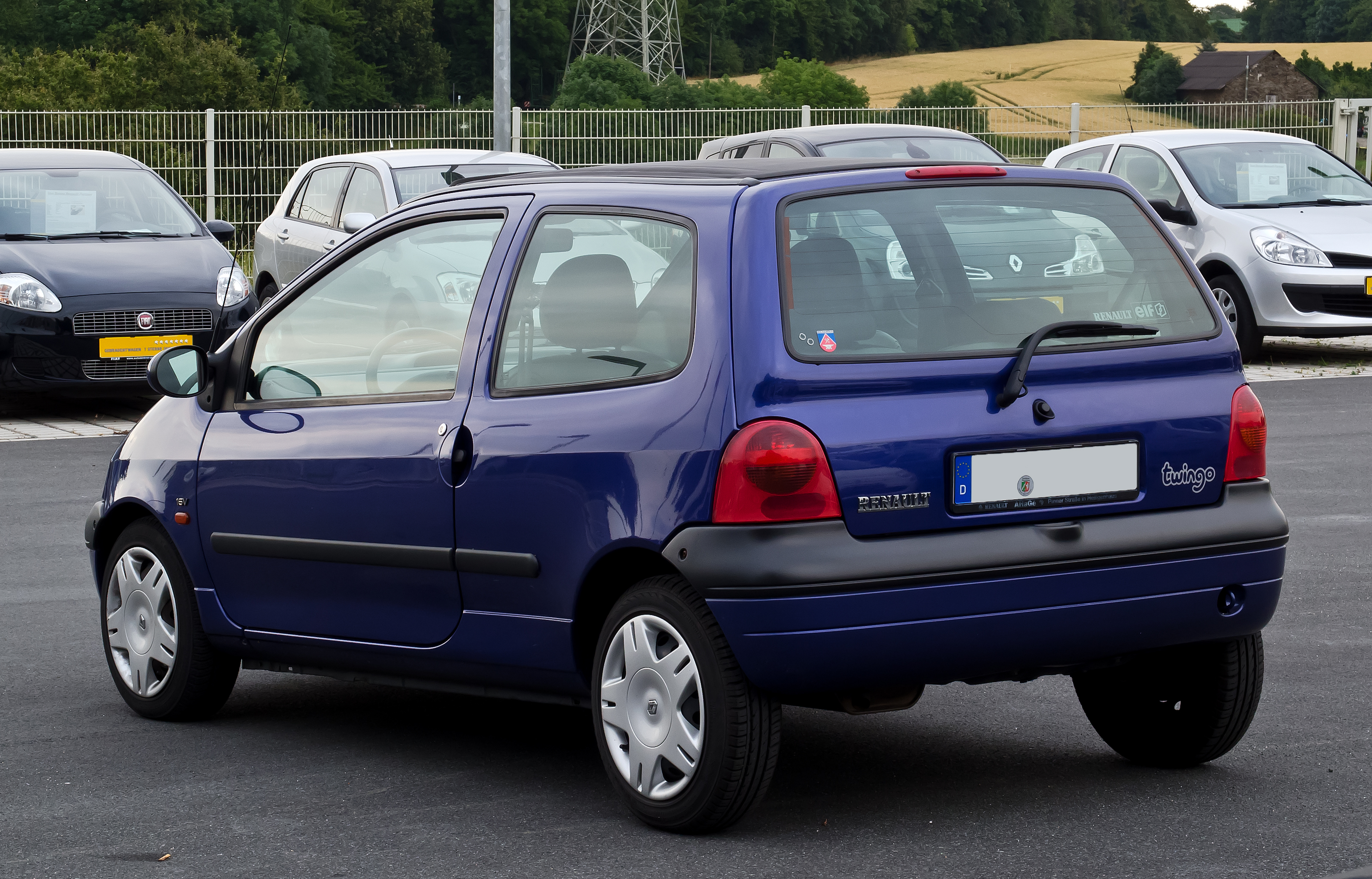 Renault Twingo (I, Facelift)